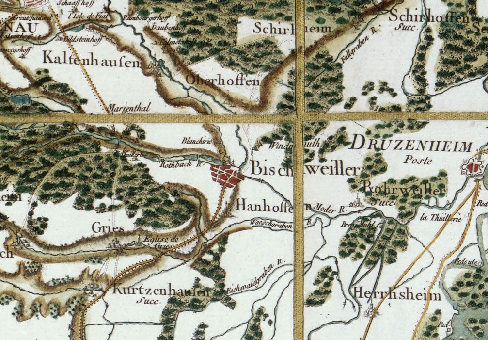 Bischwiller et ses environs au 18ème siècle. Carte Cassini.